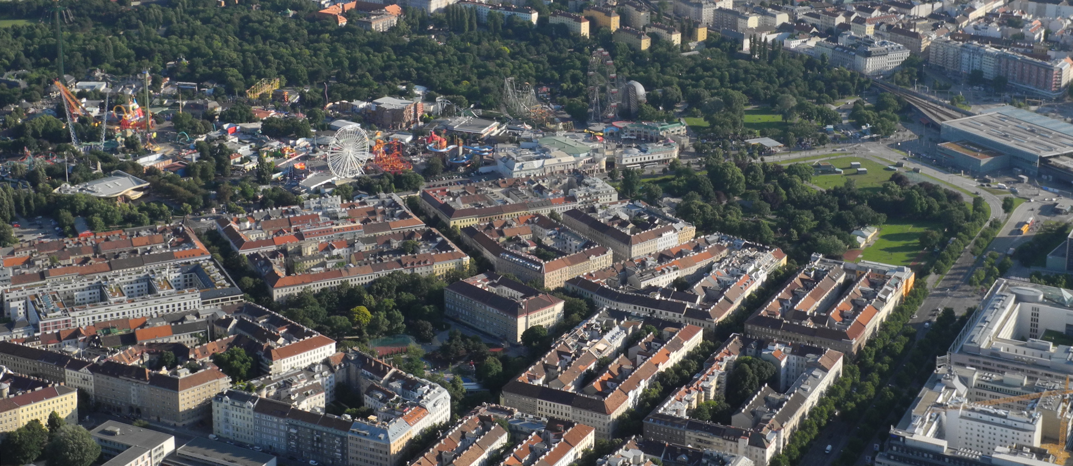 Wien: Luftaufnahme des westlichen Teils des Stuwerviertels mit dem Prater im Hintergrund